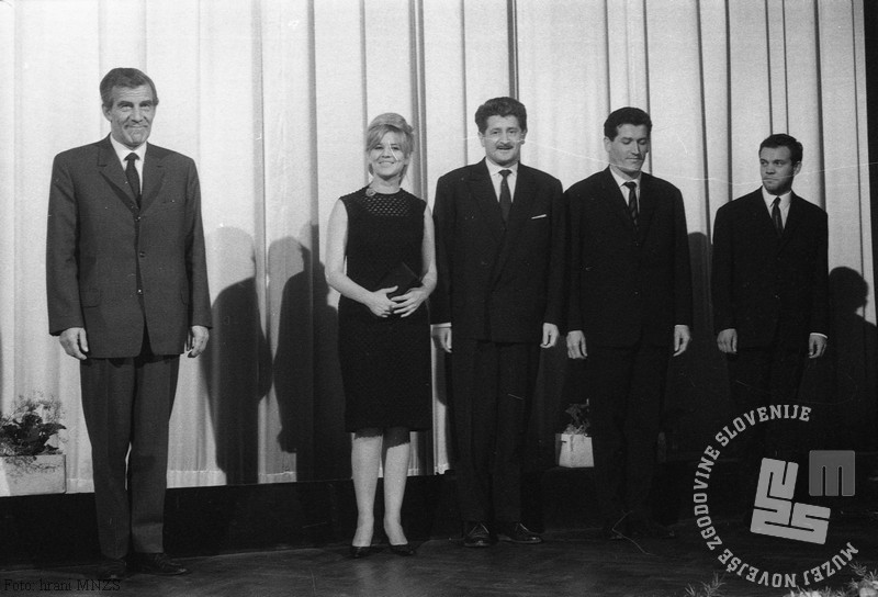 V kinu Union je bila slavnostna premiera slovenskega celovečernega filma Lucija; režiser France Kosmač in igralci: Jože Zupan, Bert Sotlar, Rudi Kosmač, Alenka Vipotnik in Kristjan Muck.